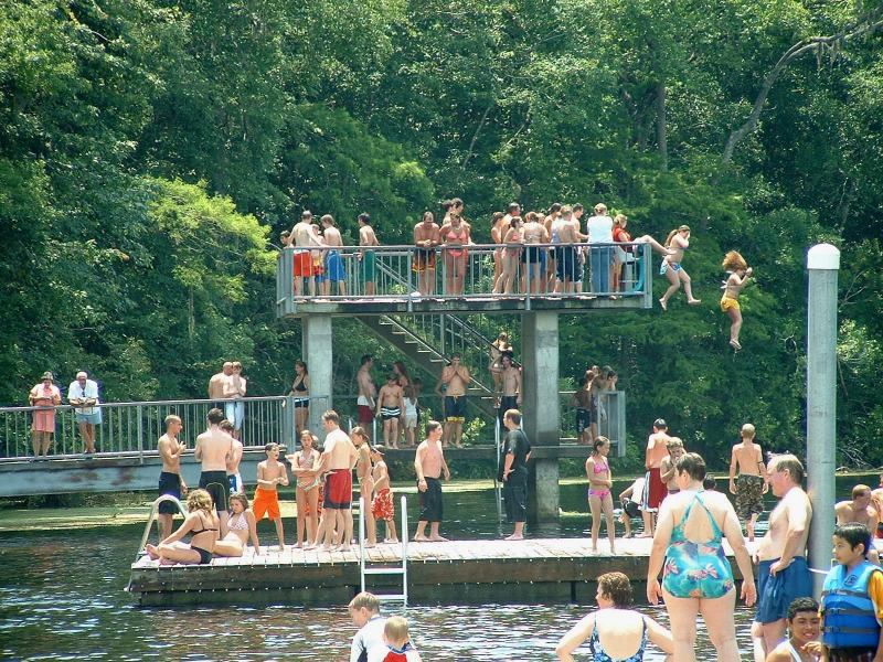 Summer at Wakulla Springs State Park, Florida USA